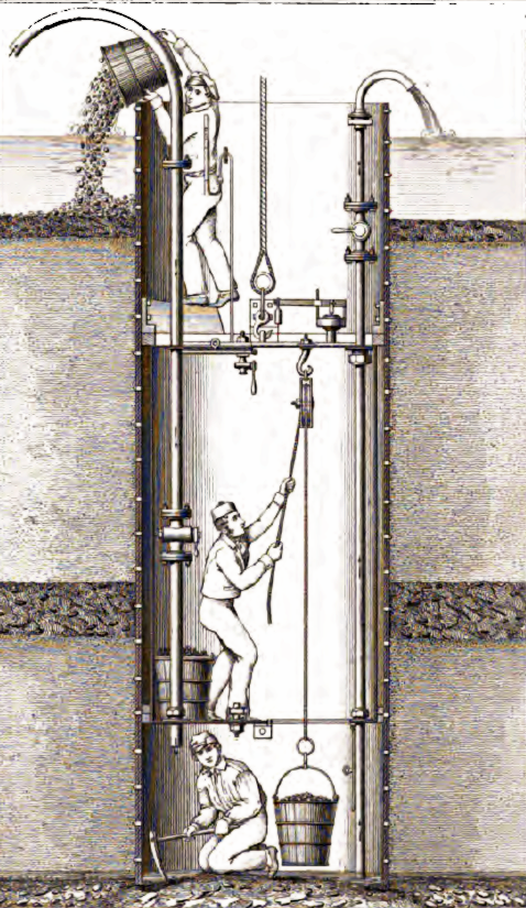 Procédé à Air Comprimé de l'ingénieur français Jules Triger.